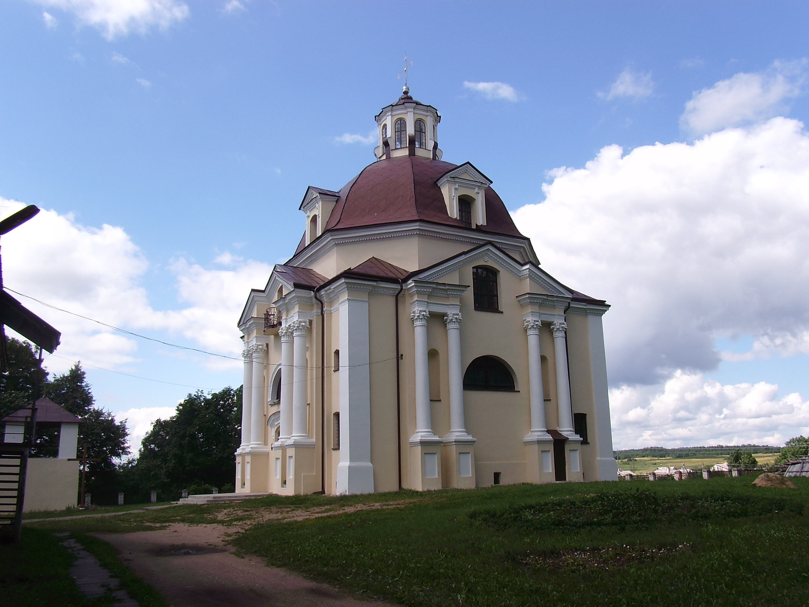 Беларуская (тарашкевіца): Комплекс былога кляштара кармэлітаў: касьцёл Маці Божай жылы дом званіца. г. Мядзел This is a photo of Belarusian heritage monument. Reference number: 612Г000414 ( WLM)